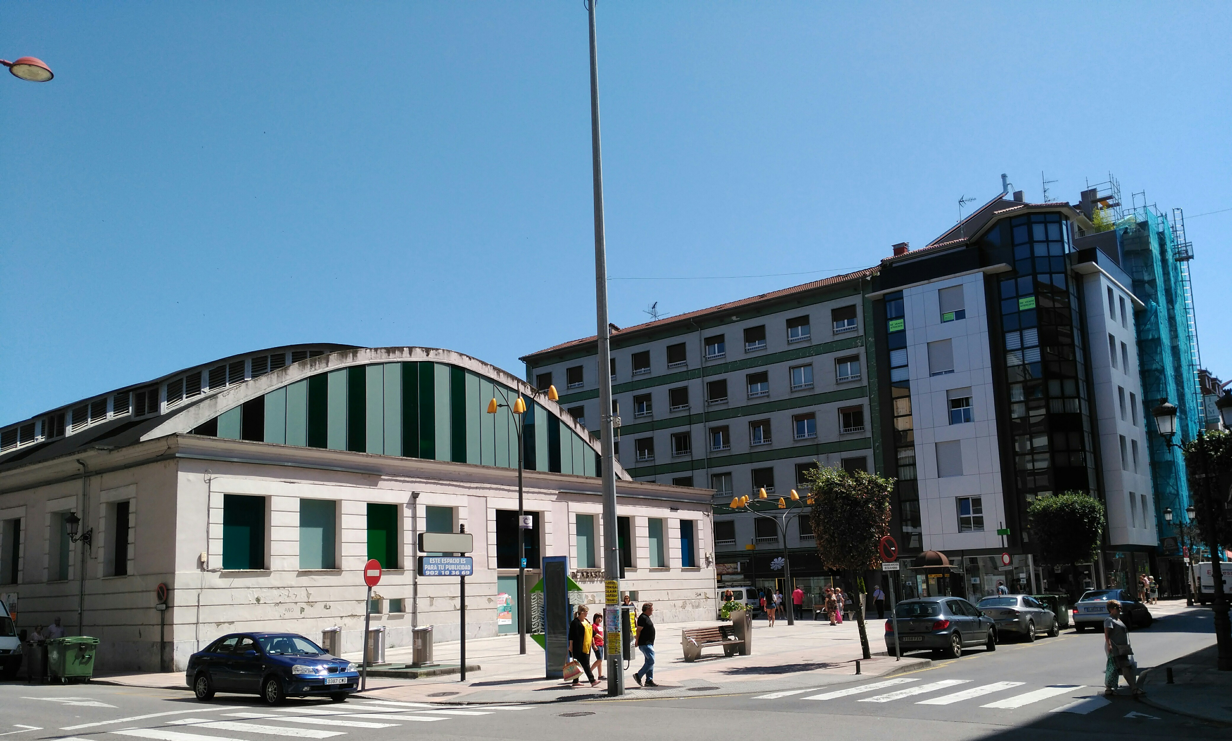 Mercado de abastos de La Felguera, Asturias